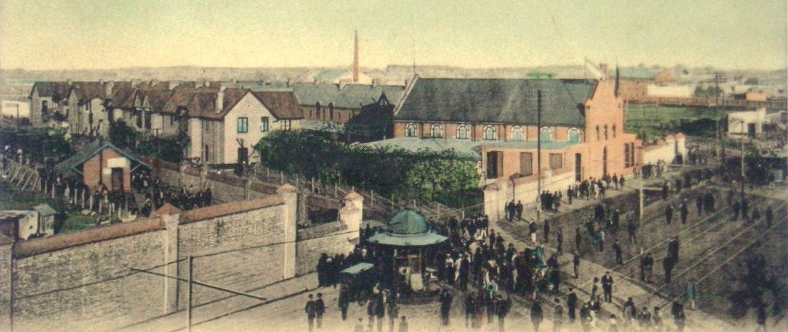 Imagen de principios de siglo XX de los talleres del ferrocarril Central Argentino en Rosario, zona en la que emergió el Club Atlético Rosario Central.